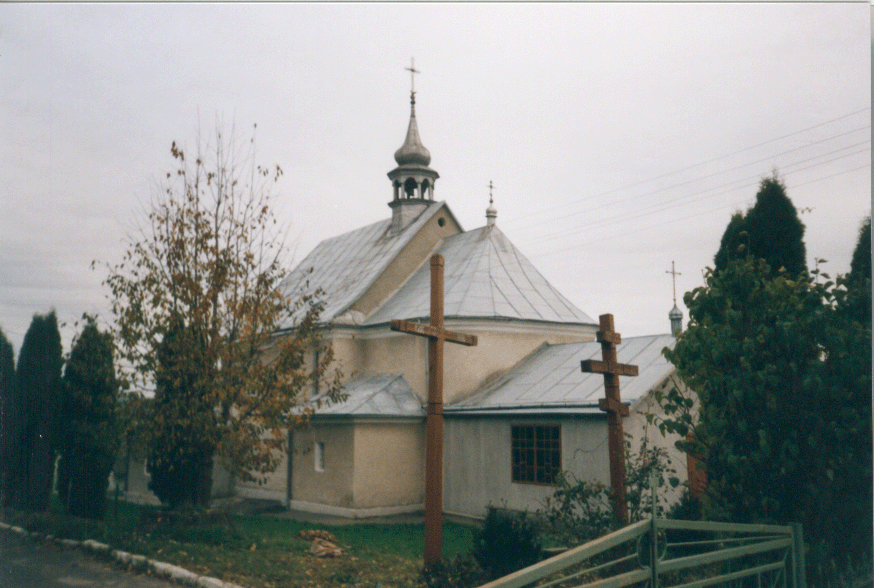 Перемишляни: The city of Peremyshlyany, Ukraine